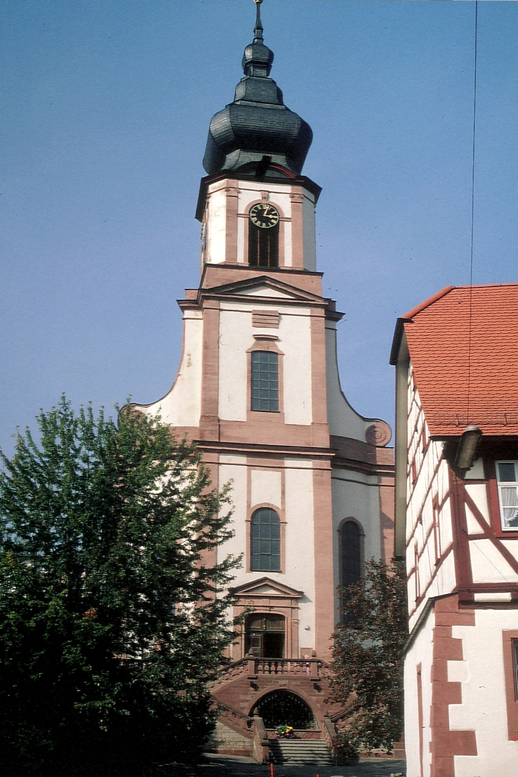 St. Martin (Königheim)